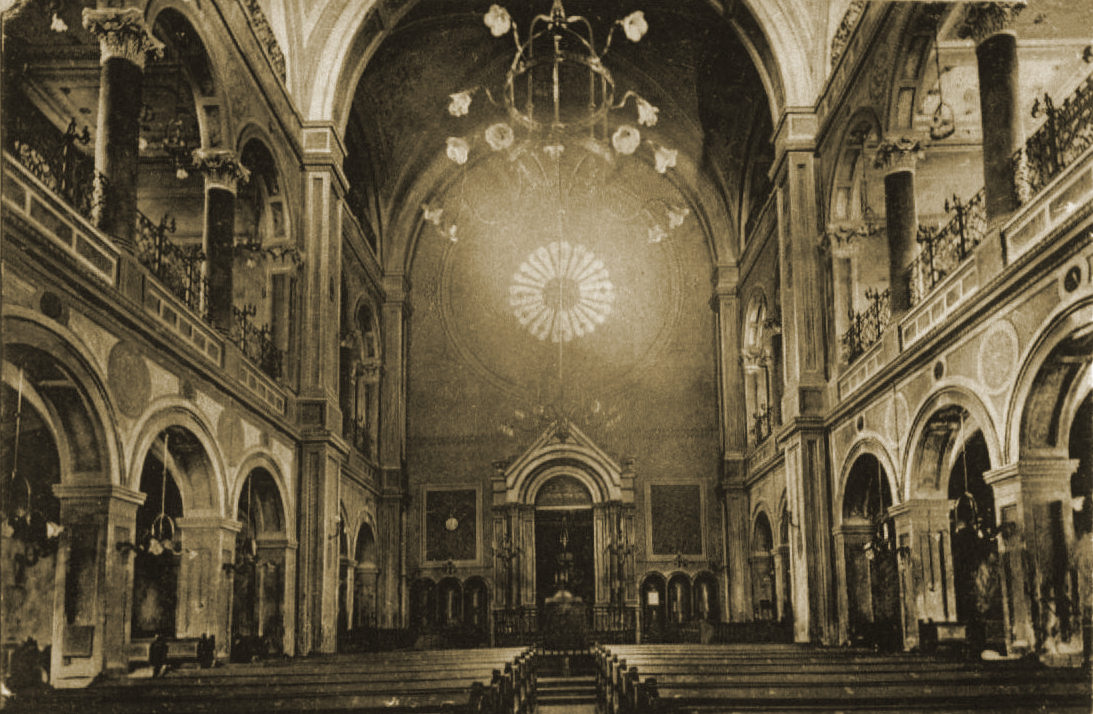 The inside of the synagogue of Pápa, Hungary. The picture originates from a postcard published by Zsigmond Steiner in the first decades of the twentieth century. A pápai zsinagóga belülről. A kép egy Steiner Zsigmond által a huszadik század első évtizedeiben kiadott képeslapról származik.